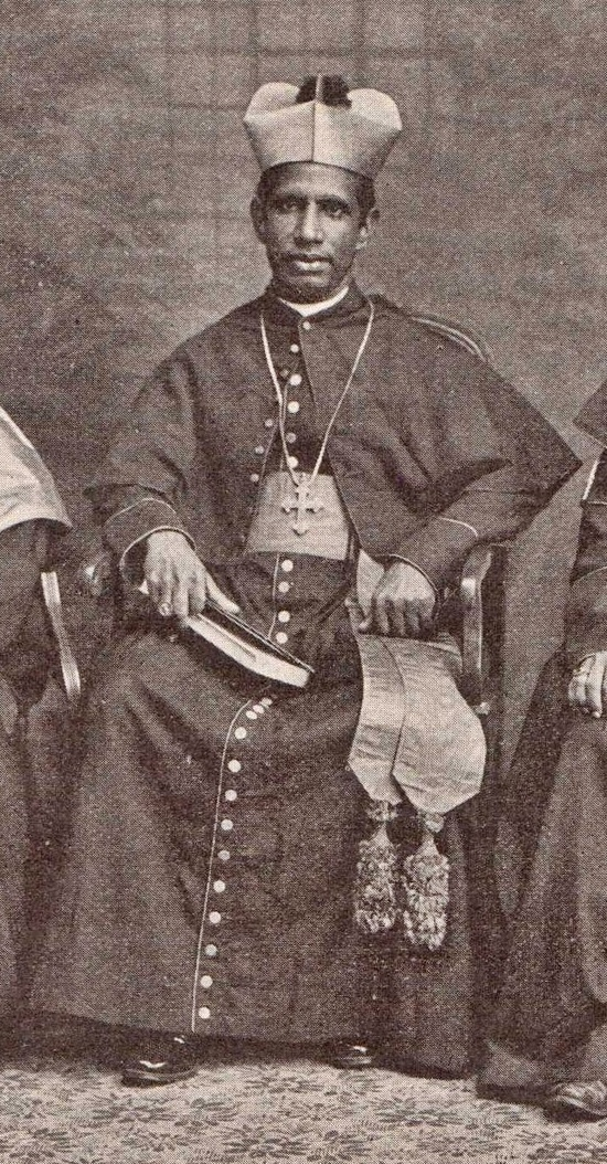 Mar Mathew Makil, Apostolischer Vikar von Changanacherry und Kottayam (1851-1914)